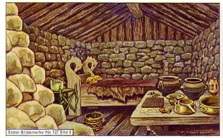 sacrau